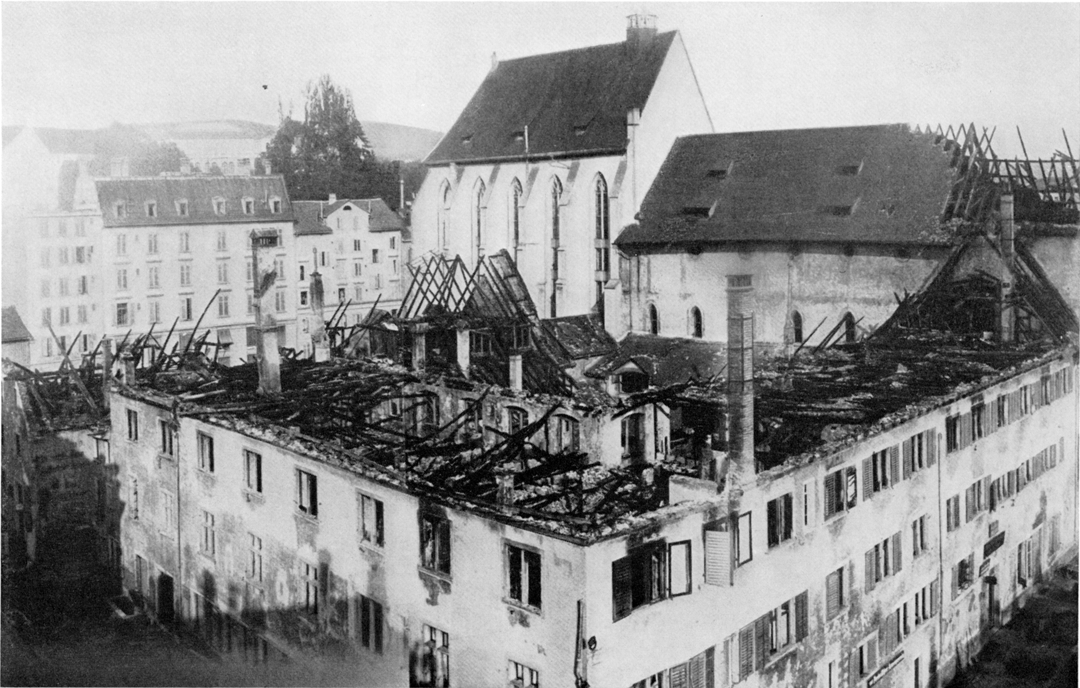 Die Gebäude des ehemaligen Predigerklosters in Zürich nach dem Brand vom 25./26. Juni 1887